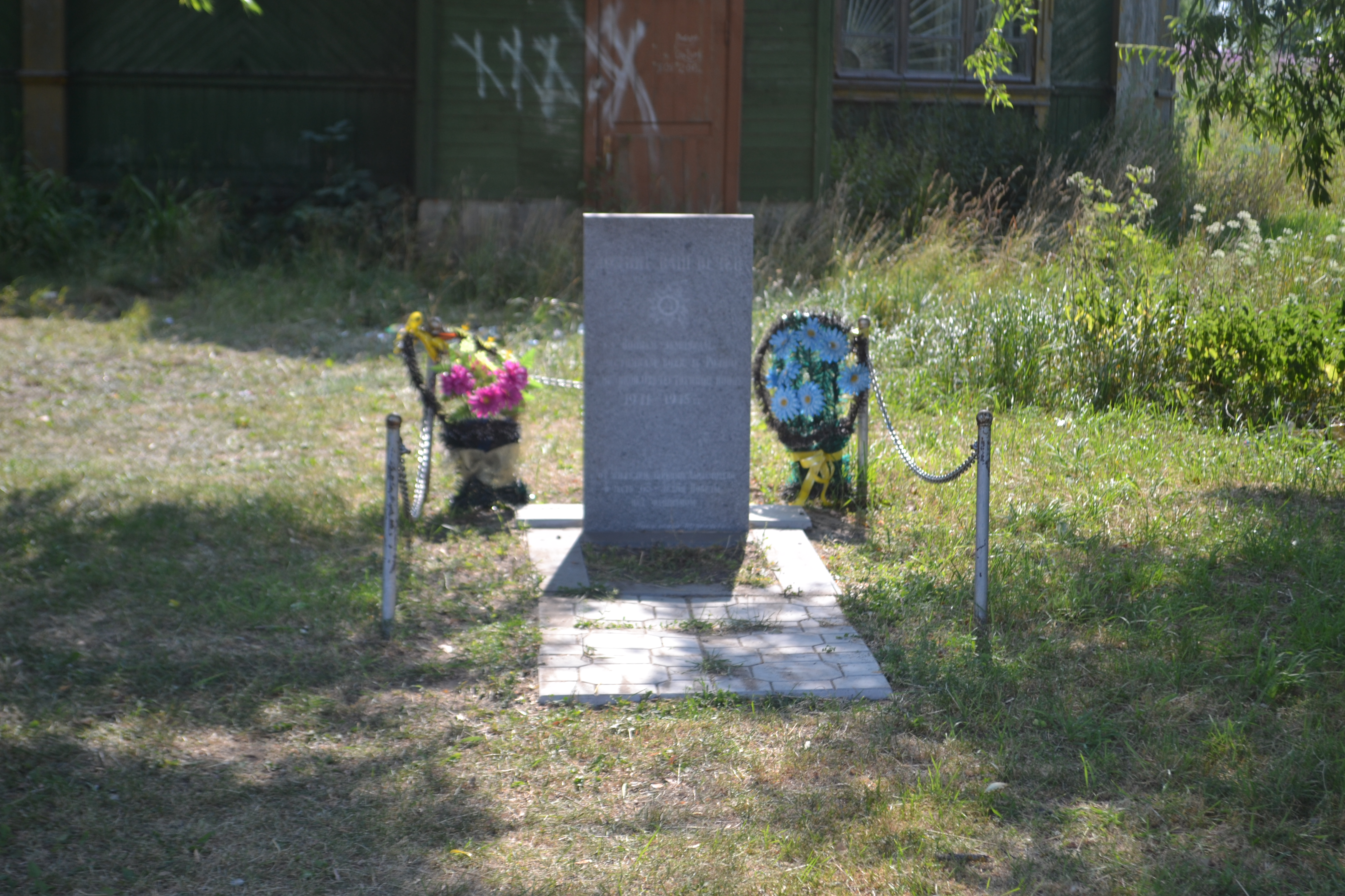 Мемориал в Харлампеево (Шатурский район)